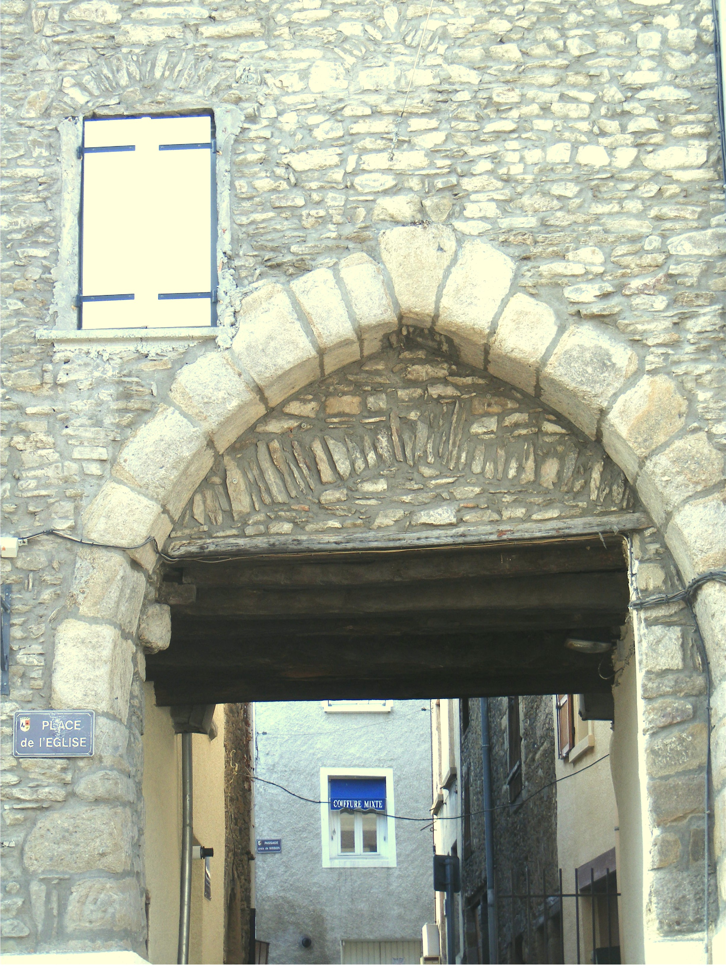 Porte principale du rempart construit au début du XIII° siècle par Renaud de Forez, archevêque de Lyon